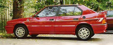 Foto eines Alfa Romeo 33